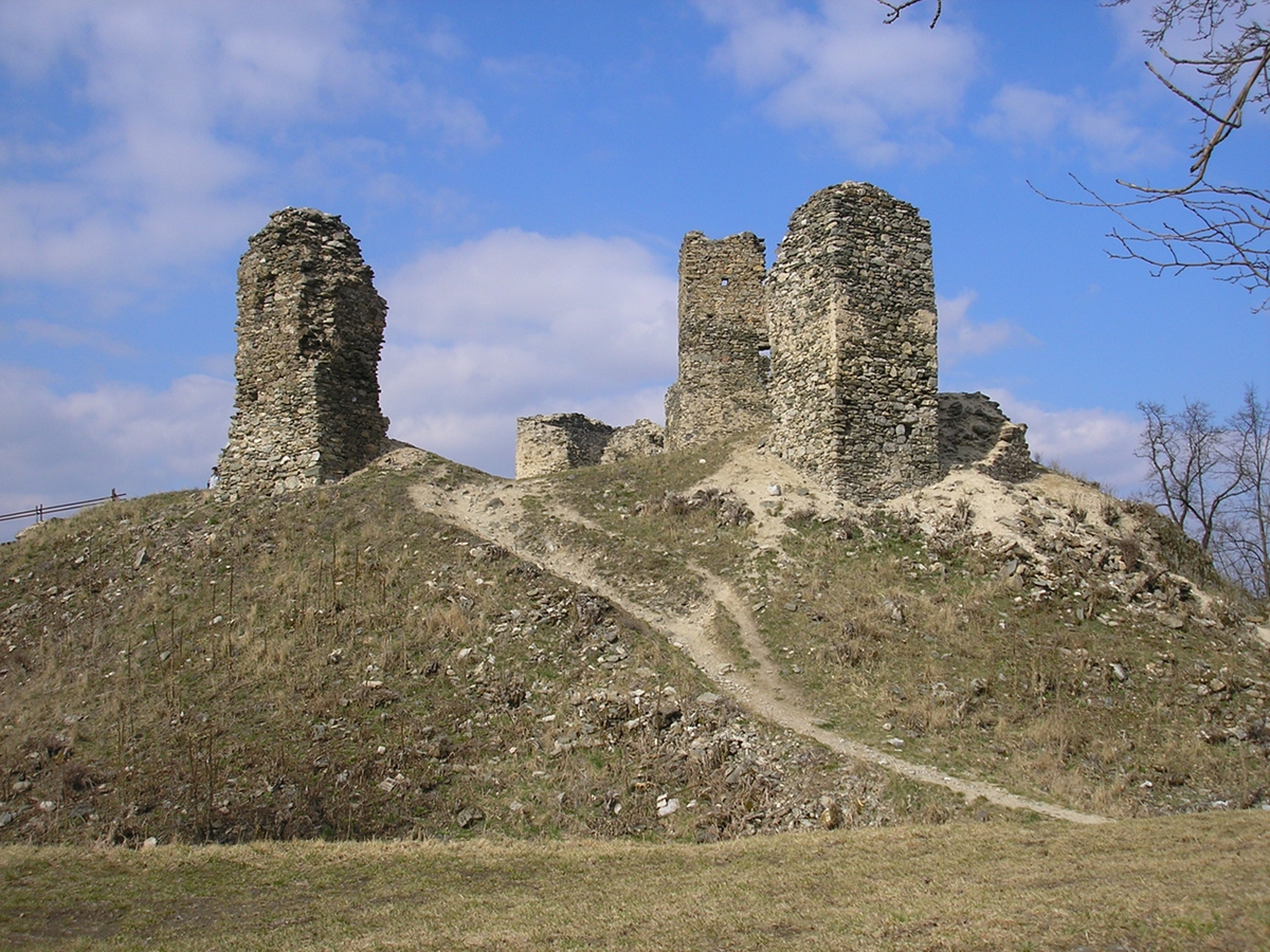 zřícenina Brníčko